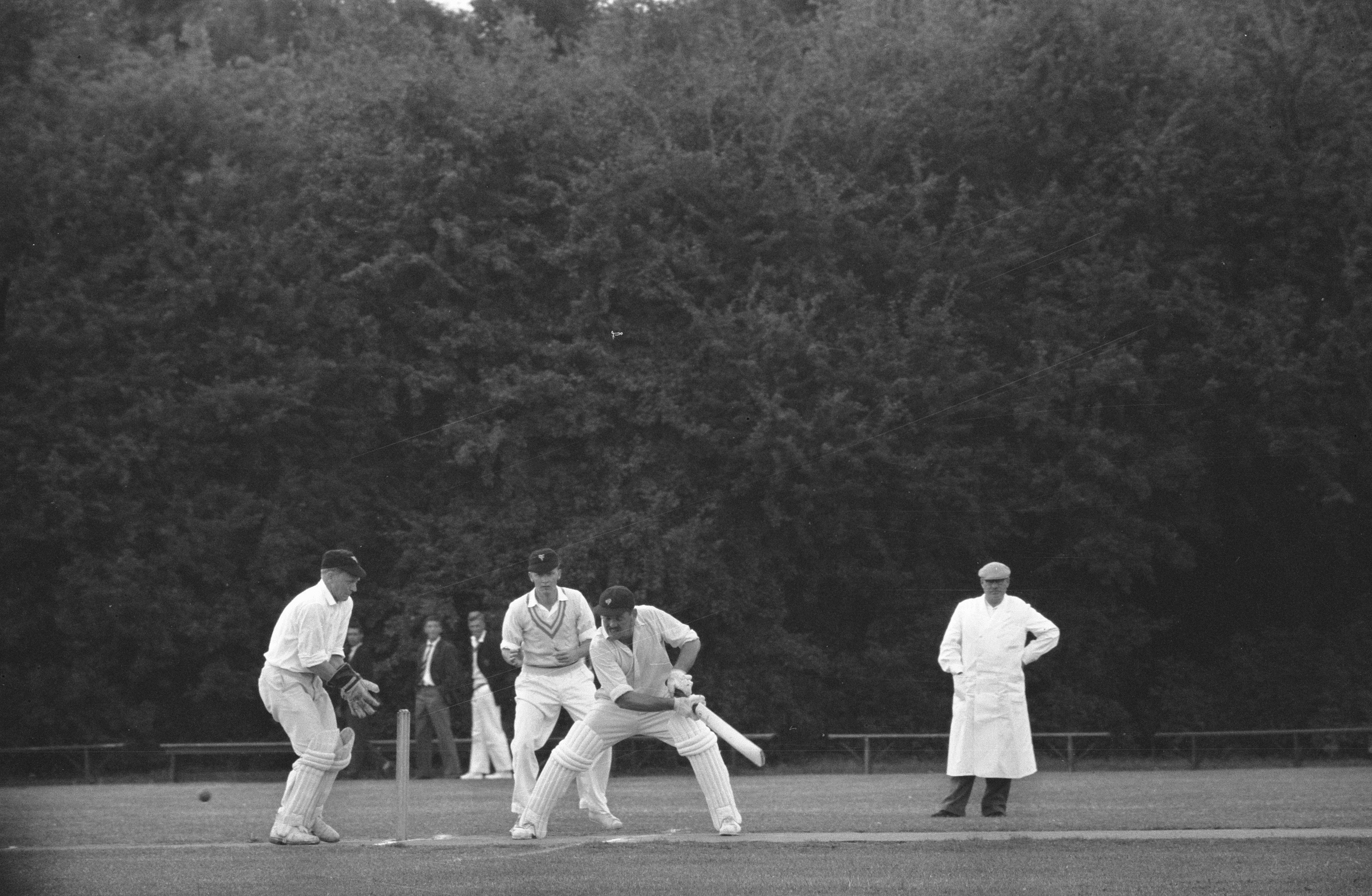 Collectie / Archief : Fotocollectie Anefo Reportage / Serie : [ onbekend ] Beschrijving : Interland cricketwedstrijd Nederland tegen Denemarken te Amstelveen Datum : 25 juli 1959 Fotograaf : Bilsen, Joop van / Anefo Auteursrechthebbende : Nationaal Archief Materiaalsoort : Negatief (zwart/wit) Nummer archiefinventaris : bekijk toegang 2.24.01.05 Bestanddeelnummer : 910-5503